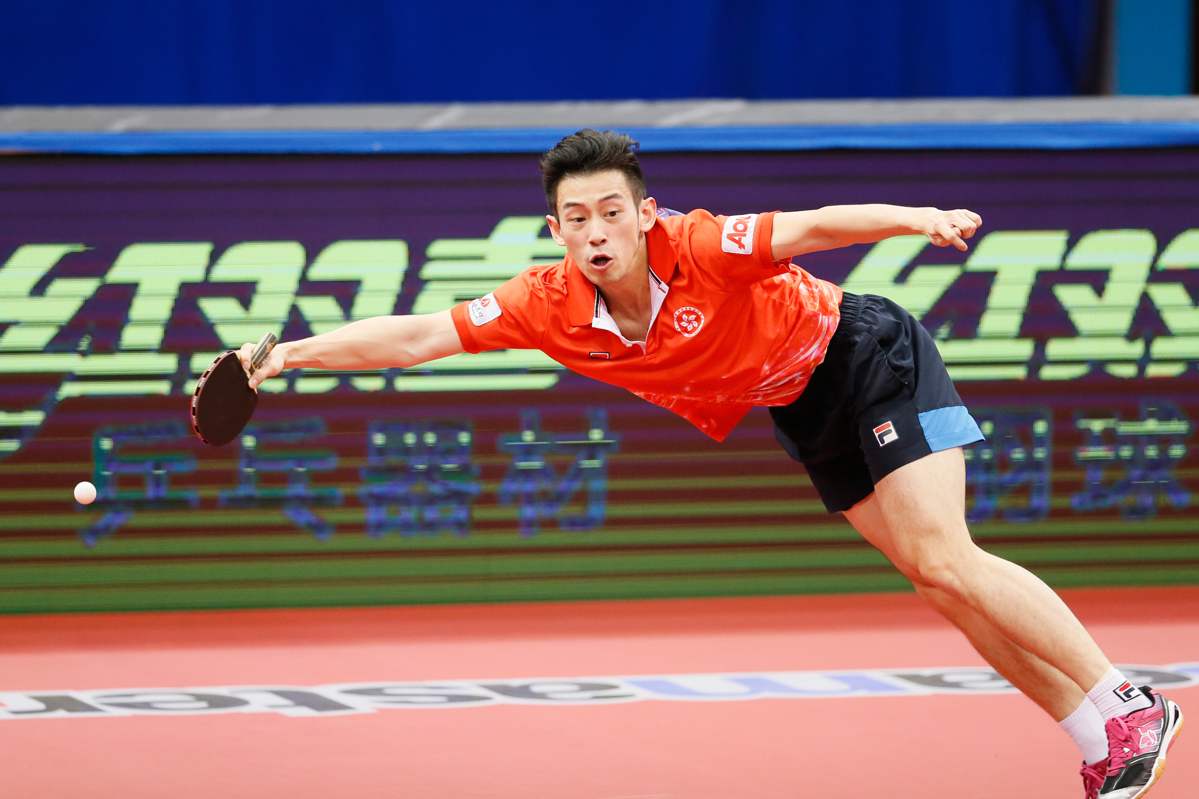 _K0K03661